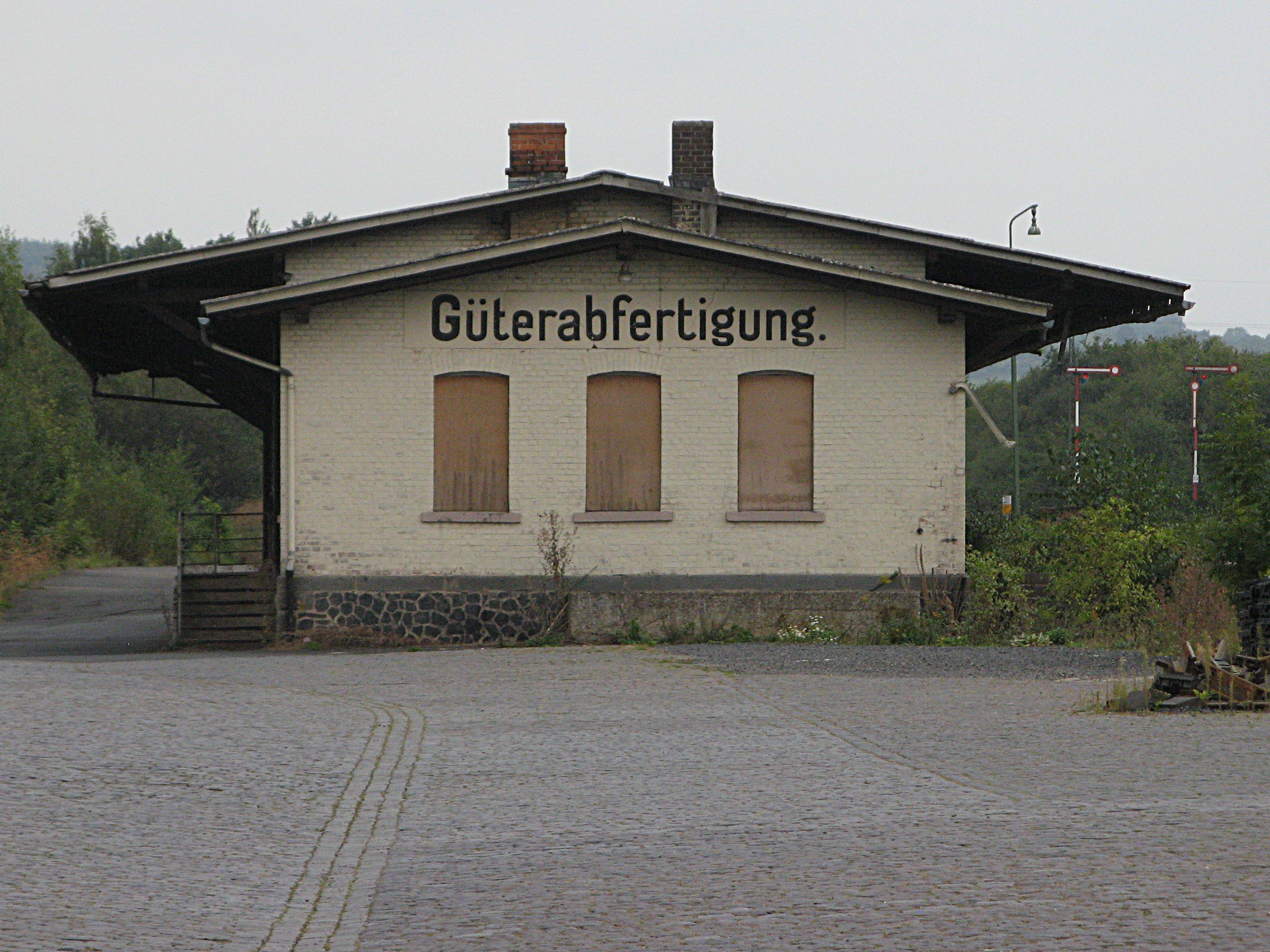 Güterabfertigungshalle am Nordbahnhof, Lauterbach (Vogelsbergkreis), Bahnhofstraße 102 Dieses Foto entstand im Rahmen des Projekts Wiki Loves Monuments Mittelhessen, das aus dem Community-Projektbudget von Wikimedia Deutschland e. V. gefördert wurde.